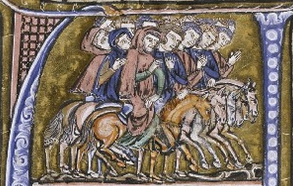 Départ pour la première Croisade